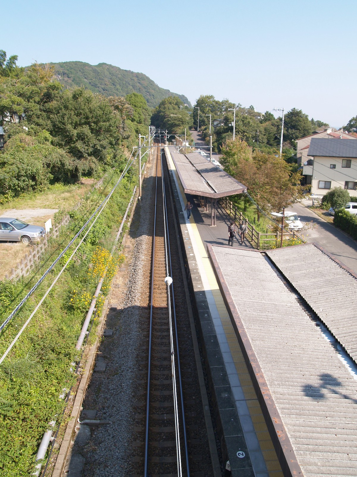 城ヶ崎海岸駅ホーム（跨線橋より撮影）